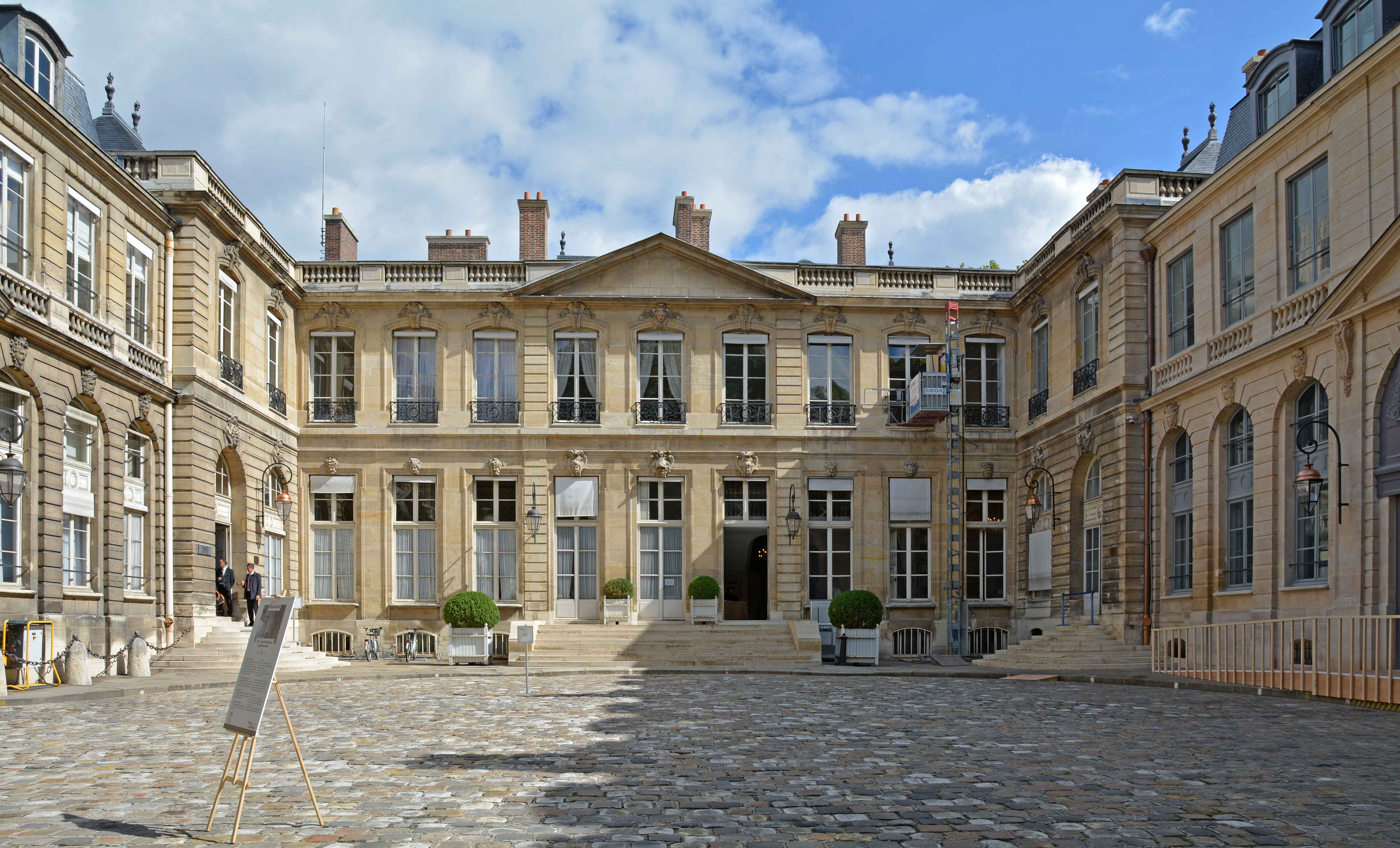 Hôtel de Roquelaure Paris 7ème arrondissement, France .